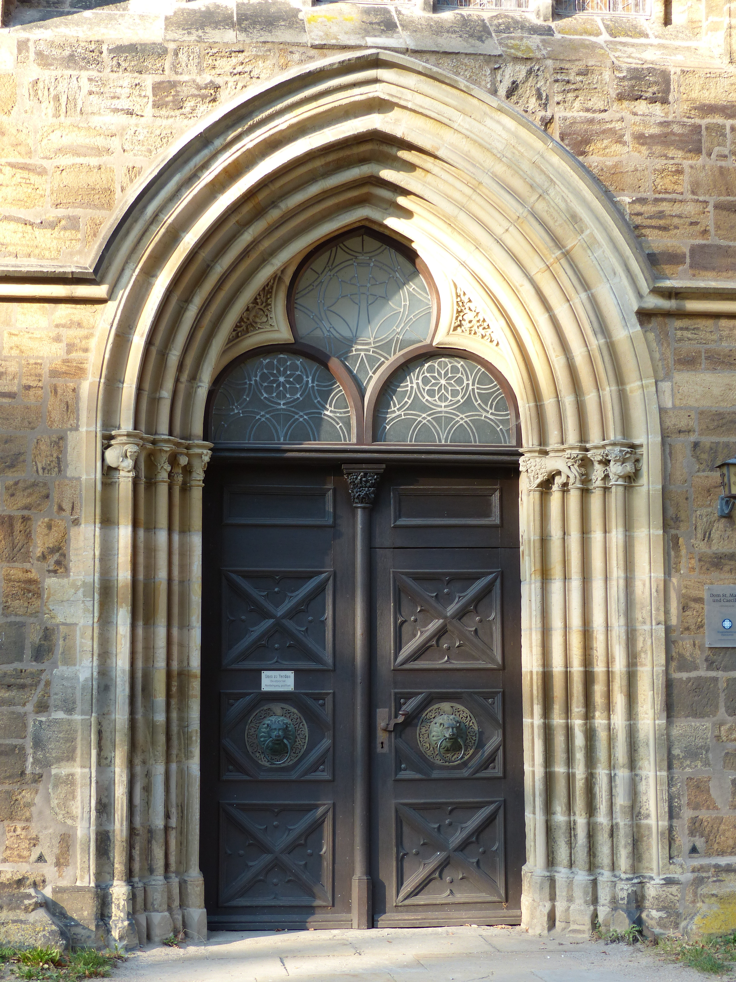 Verdener Dom, Südportal mit Tierdarstellungen an den Kämpferkapitellen